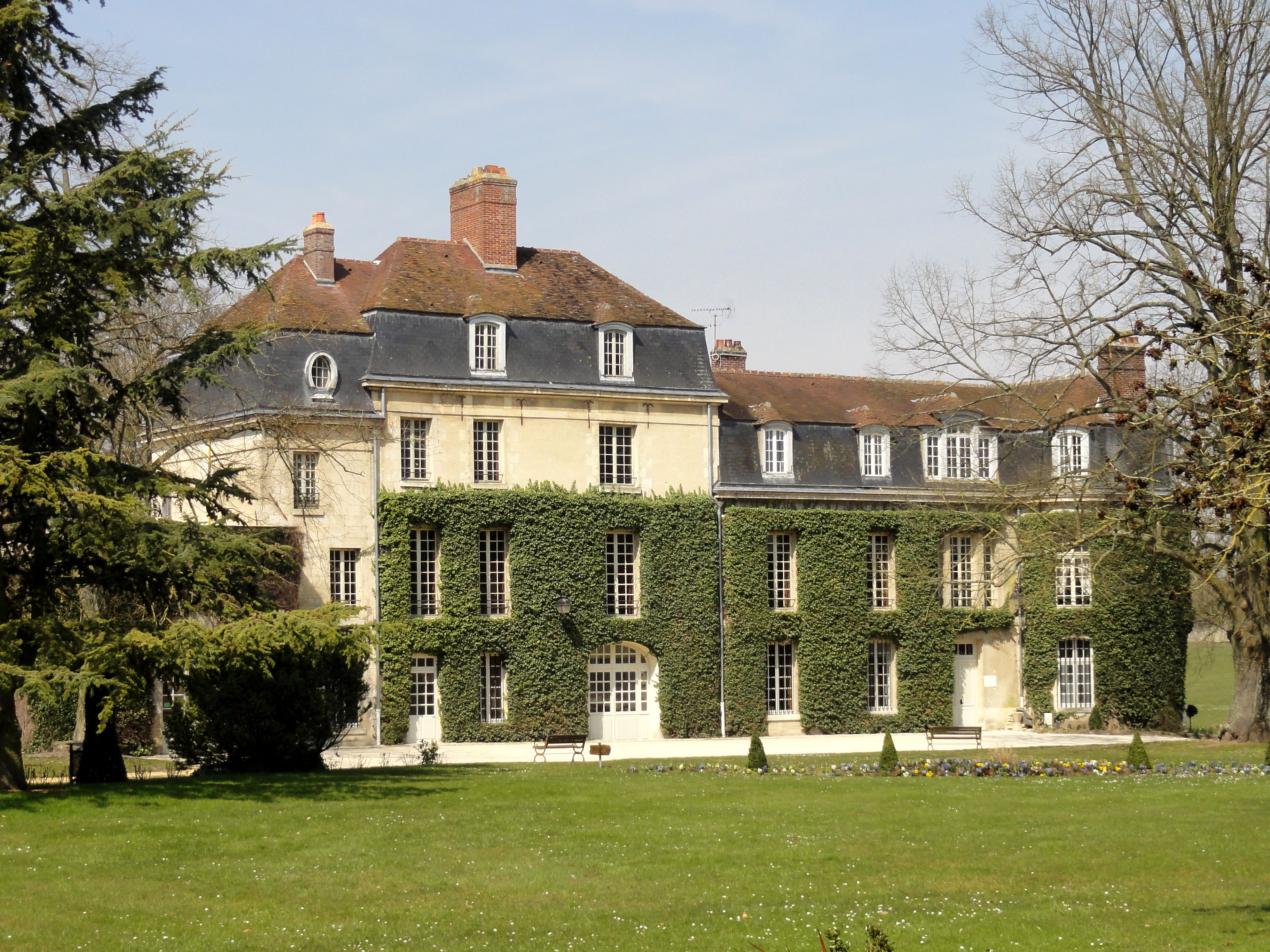 Château de Bayser (actuellement crêche municipale), édifié sur les emprises de l'ancienne abbaye.